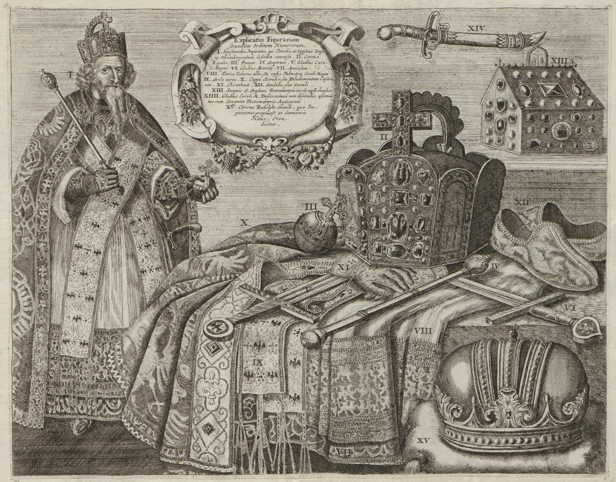 Grafik aus dem Klebeband Nr. 16 („Leichbegängnisse“) der Fürstlich Waldeckschen Hofbibliothek Arolsen Motiv: „Abbildung des Kaiserlichen Ornats und anderer Kleinodien“ Verlag: Peter Conrad Monath, Nürnberg